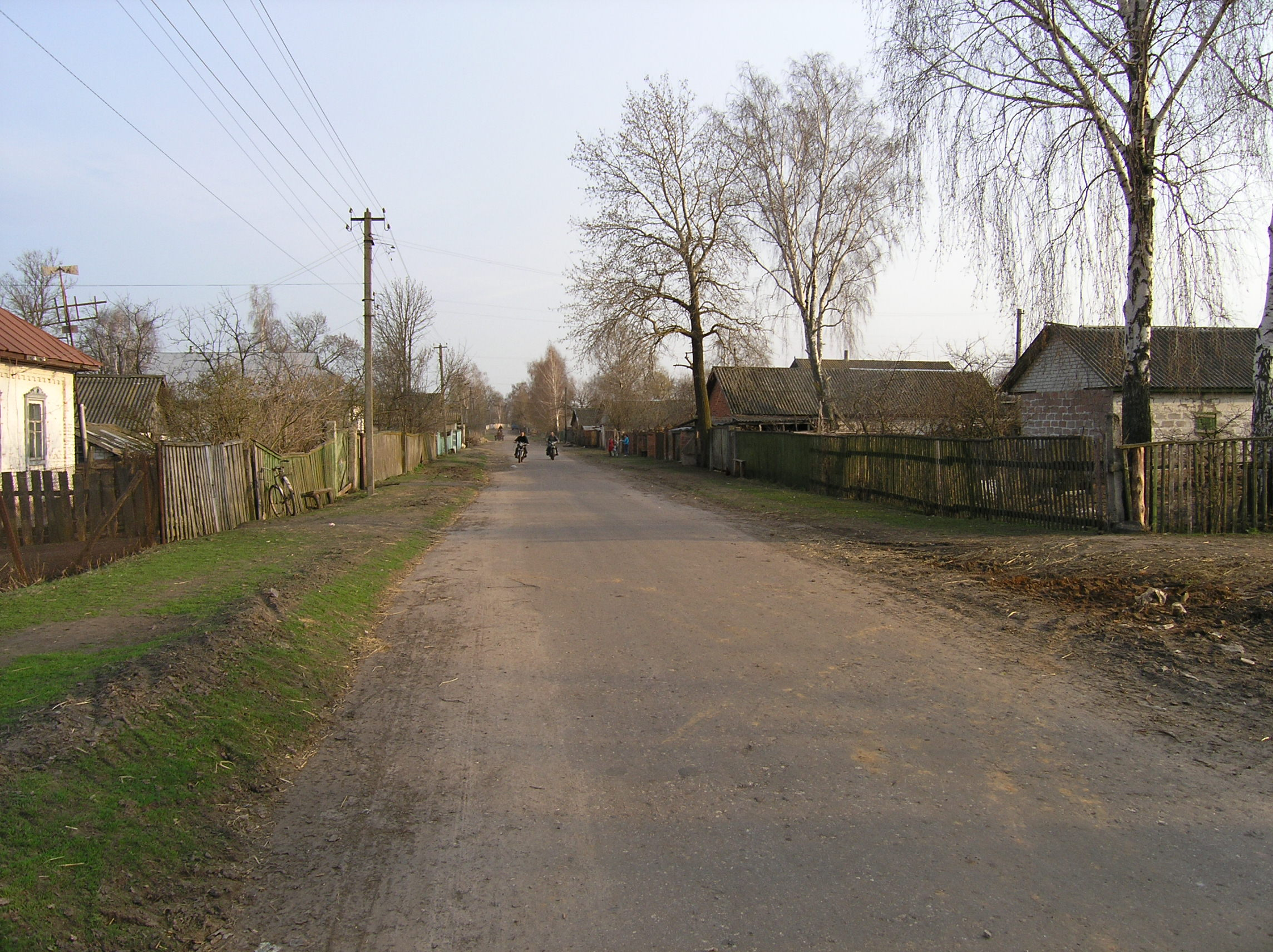 Вулиця с.Роїще. вулиця Зарічня